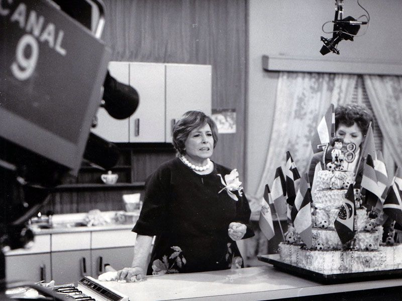 Doña Petrona y su asistente Juanita filmando su programa de televisión, con una torta haciendo referencia a la Copa Mundial de Fútbol de 1978.